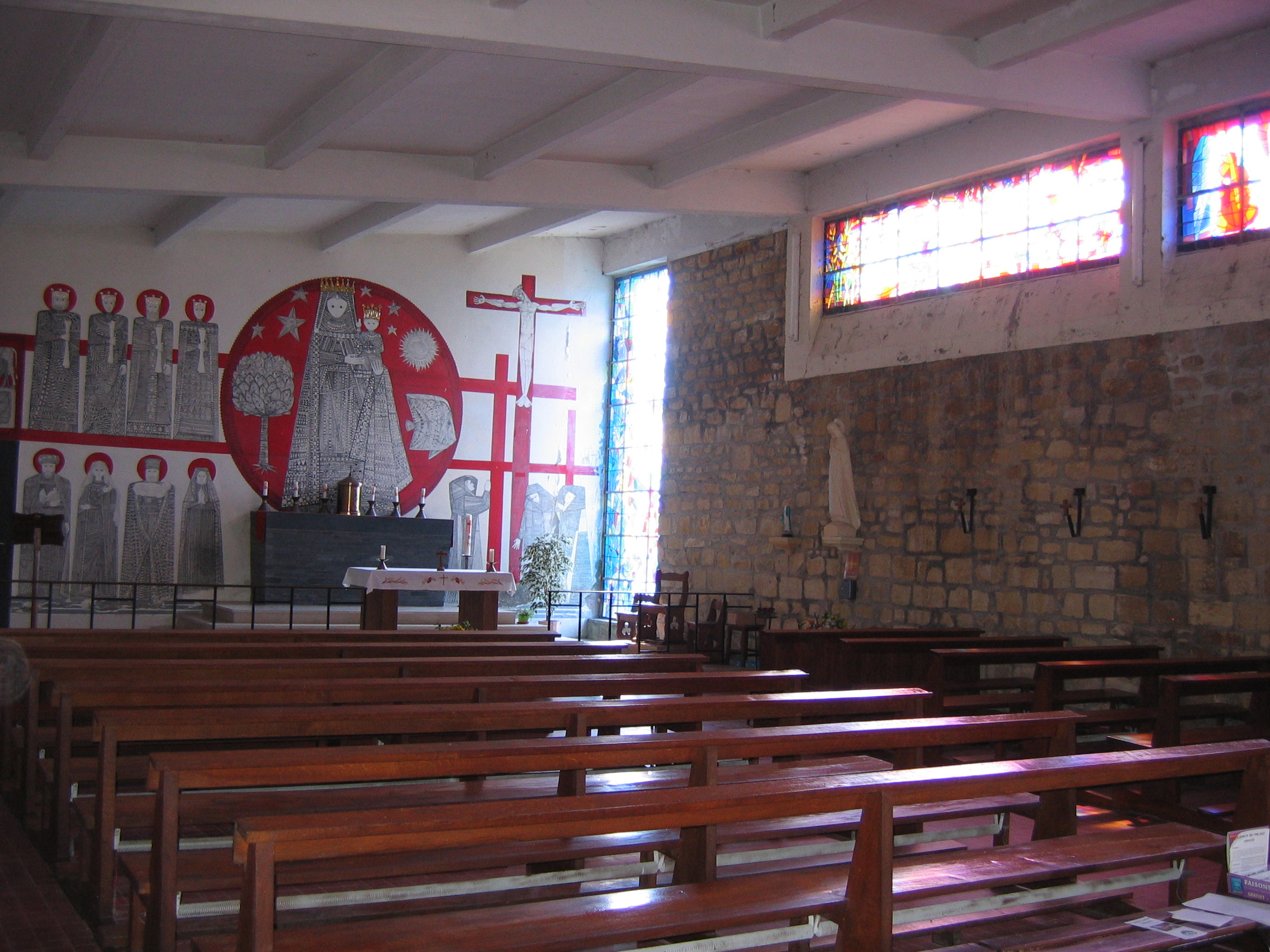 Eglise de Stonne. Vue générale de l'intérieur